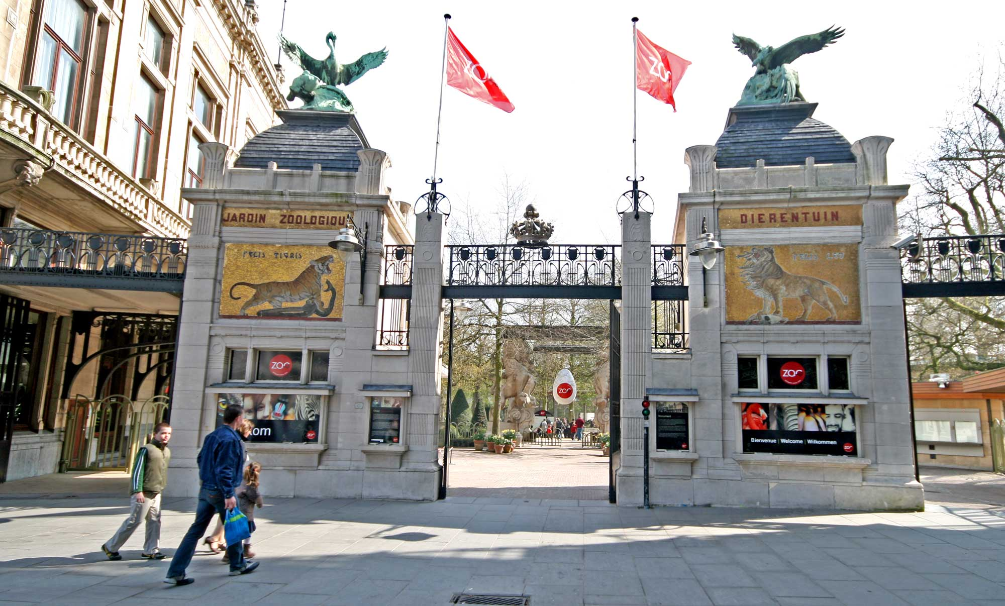 Zoo vun Antwerpen Entrée